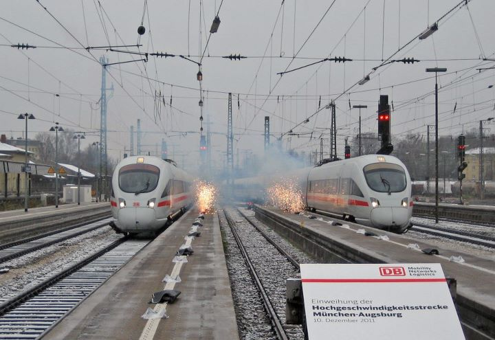 Offizieller Abschluss des Ausbauprojektes Bahnstrecke München–Augsburg nach 13 Jahren Bauarbeiten am 11. Dezember 2011. Anlässlich der Eröffnung fahren zwei ICE-T-Sonderzüge parallel in den Hauptbahnhof Augsburg ein.